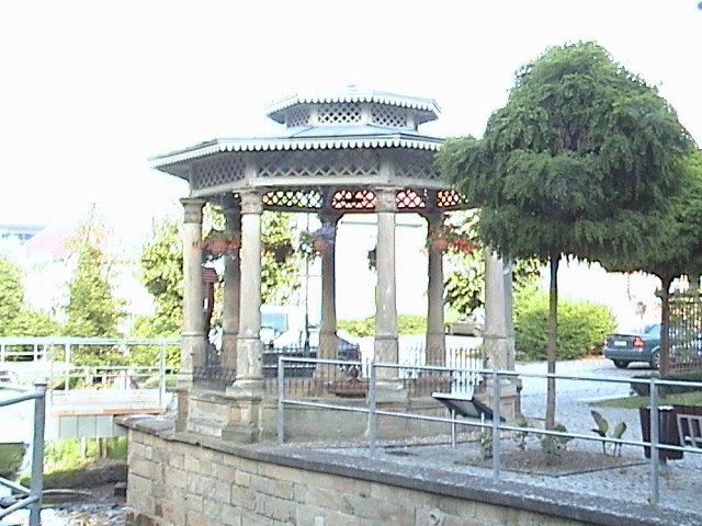 Gesundbrunnen zu Bad Bibra